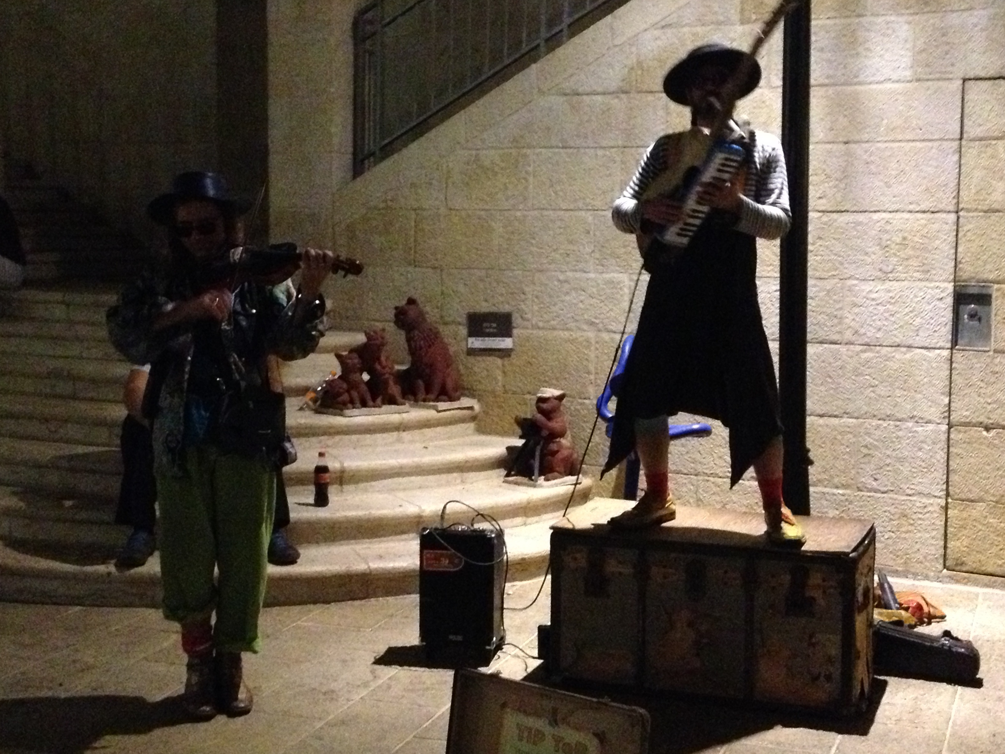 Klezmer musicians in Jerusalem